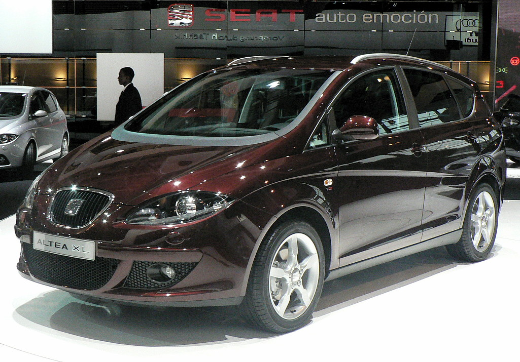 Mondial de l'automobile, Paris 2006